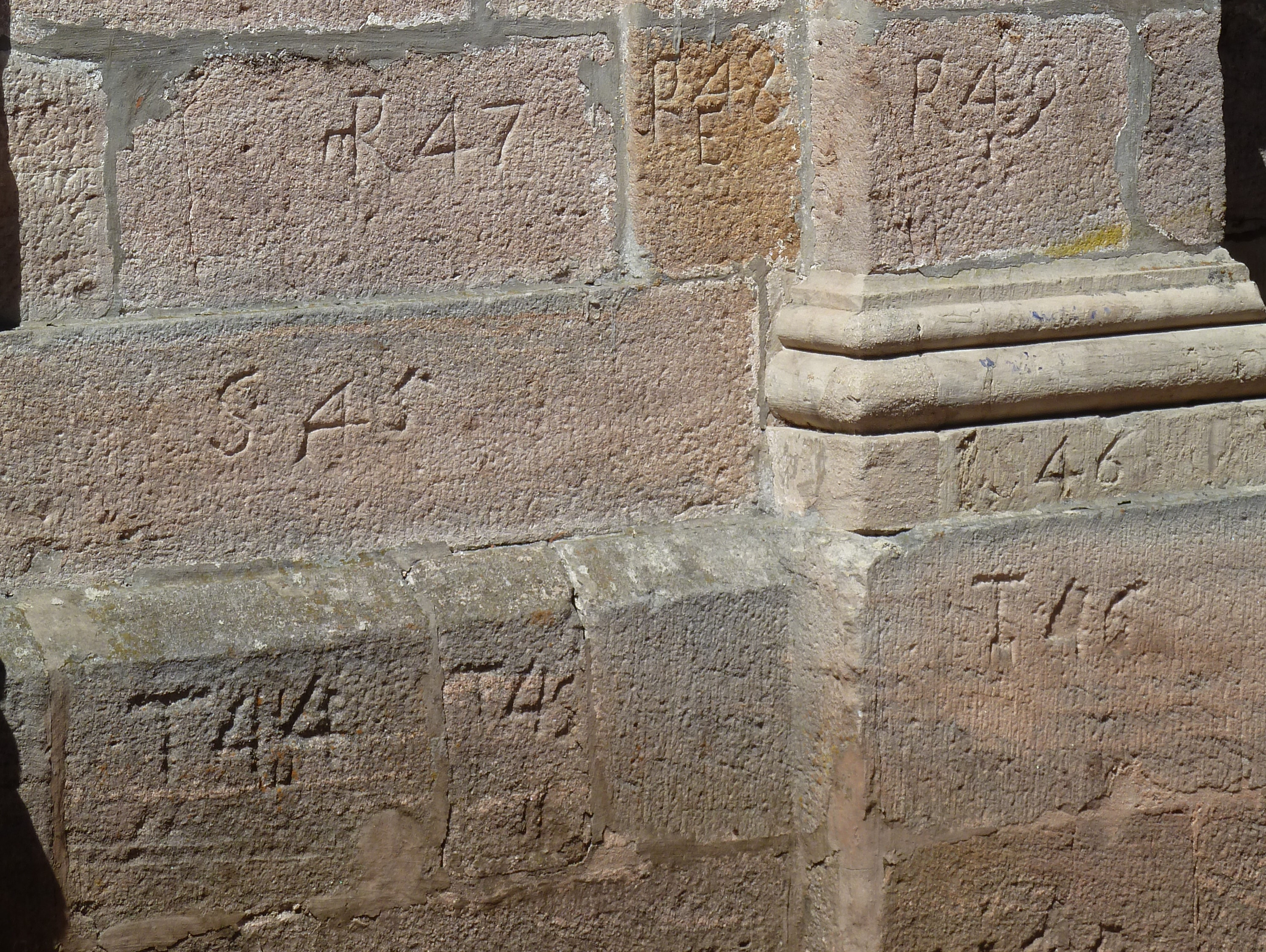 Nummerierte Steine an der Bonndorfer Schlosskapelle